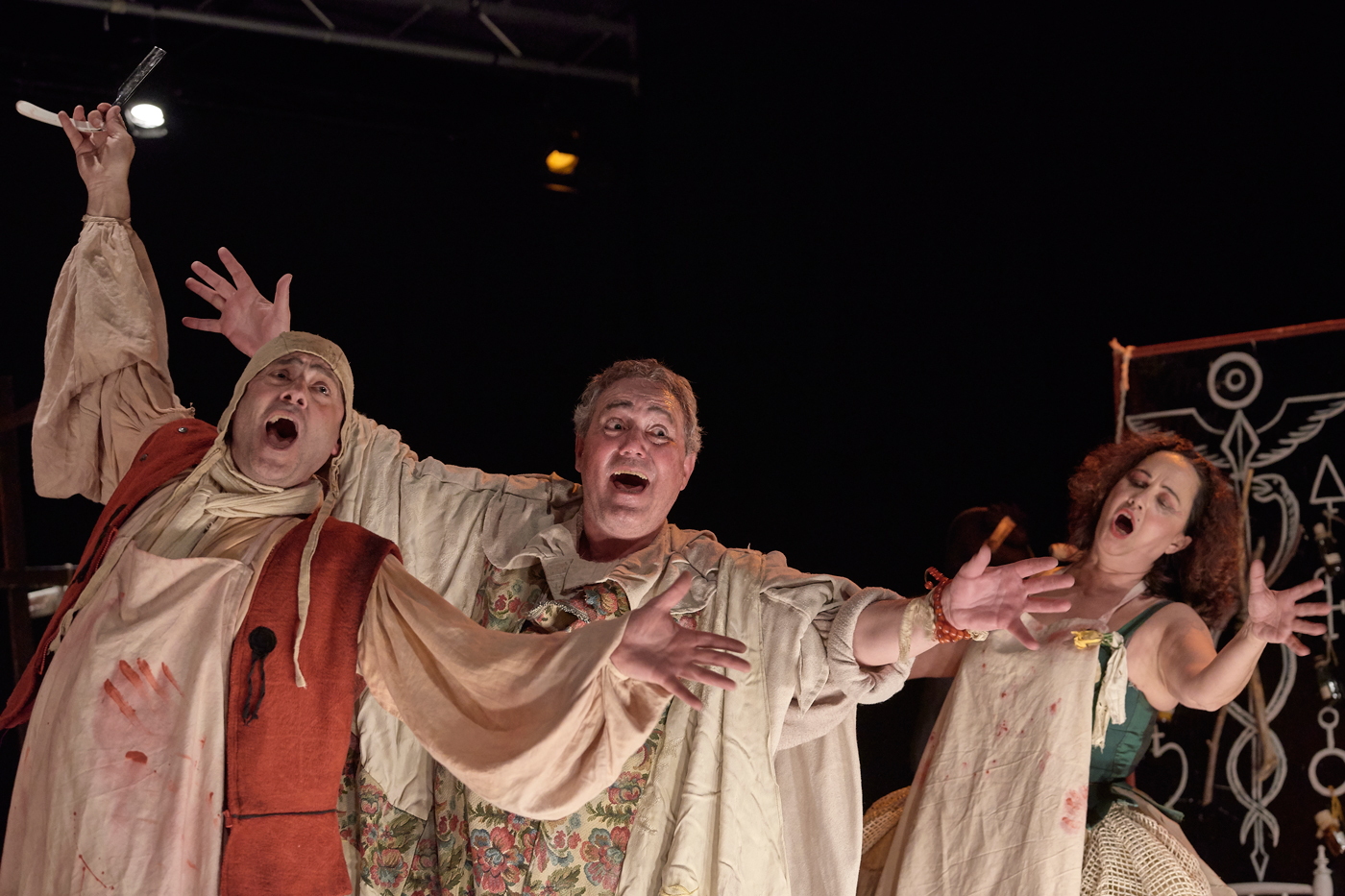 Camino del Paraíso, una de las obras producidas por Teatro Guirigai en una representación en la Sala Guirigai en 2019